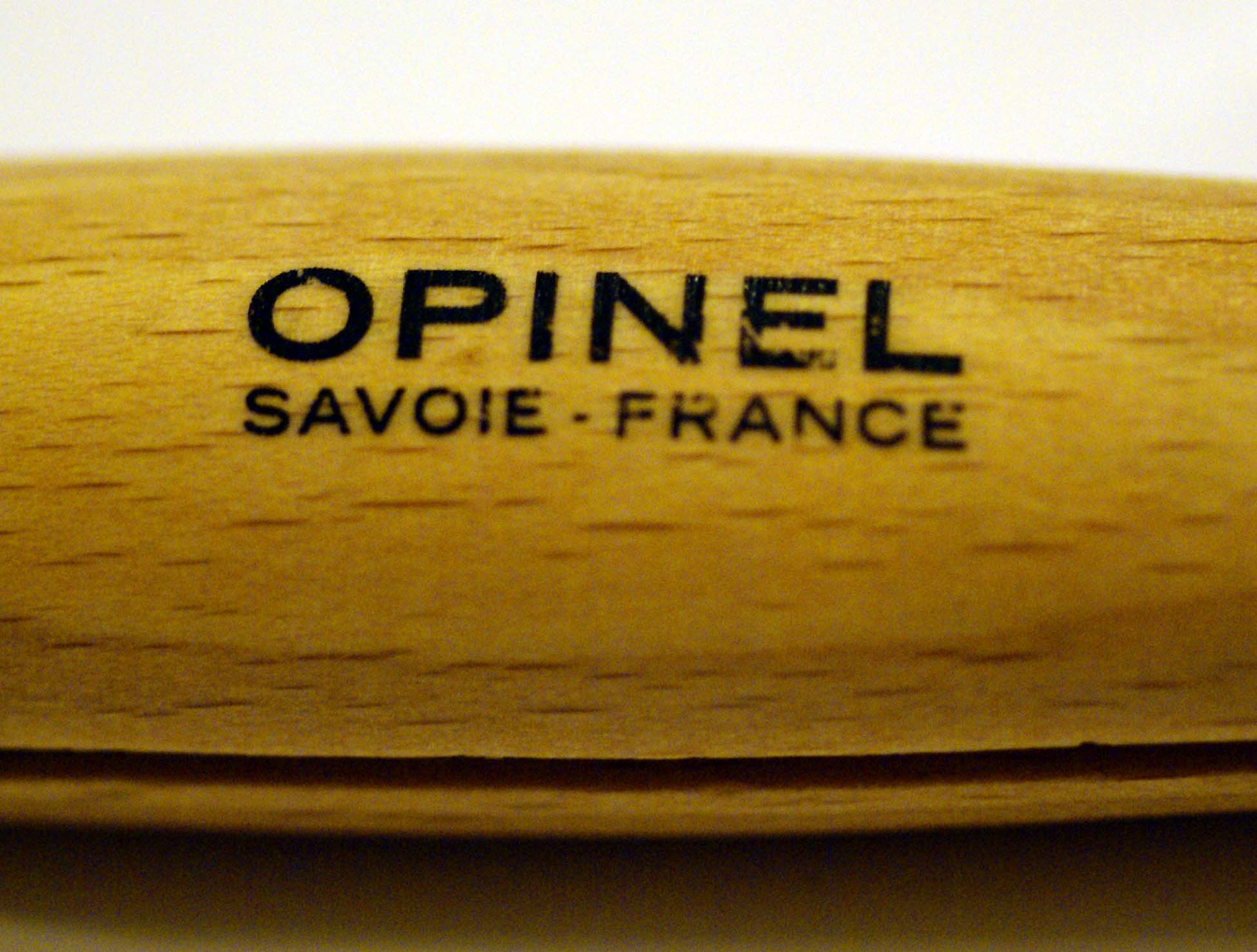 Opinel Knife Logo